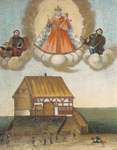 Votivbild mit Maria im Stein, hl. Jakobus, Evangelist Markus und einer Kriegsszene vor einem Bauernhaus, 1796 Oi on cavans, 55 x 44.5 cm Liebfrauenkapelle Taiserdorf, Owingen, Bodenseekreis